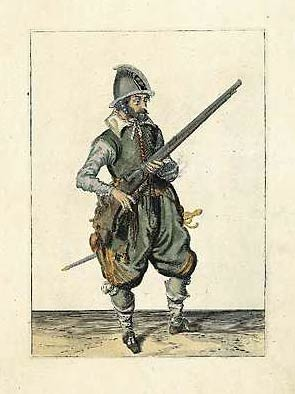 Musketer